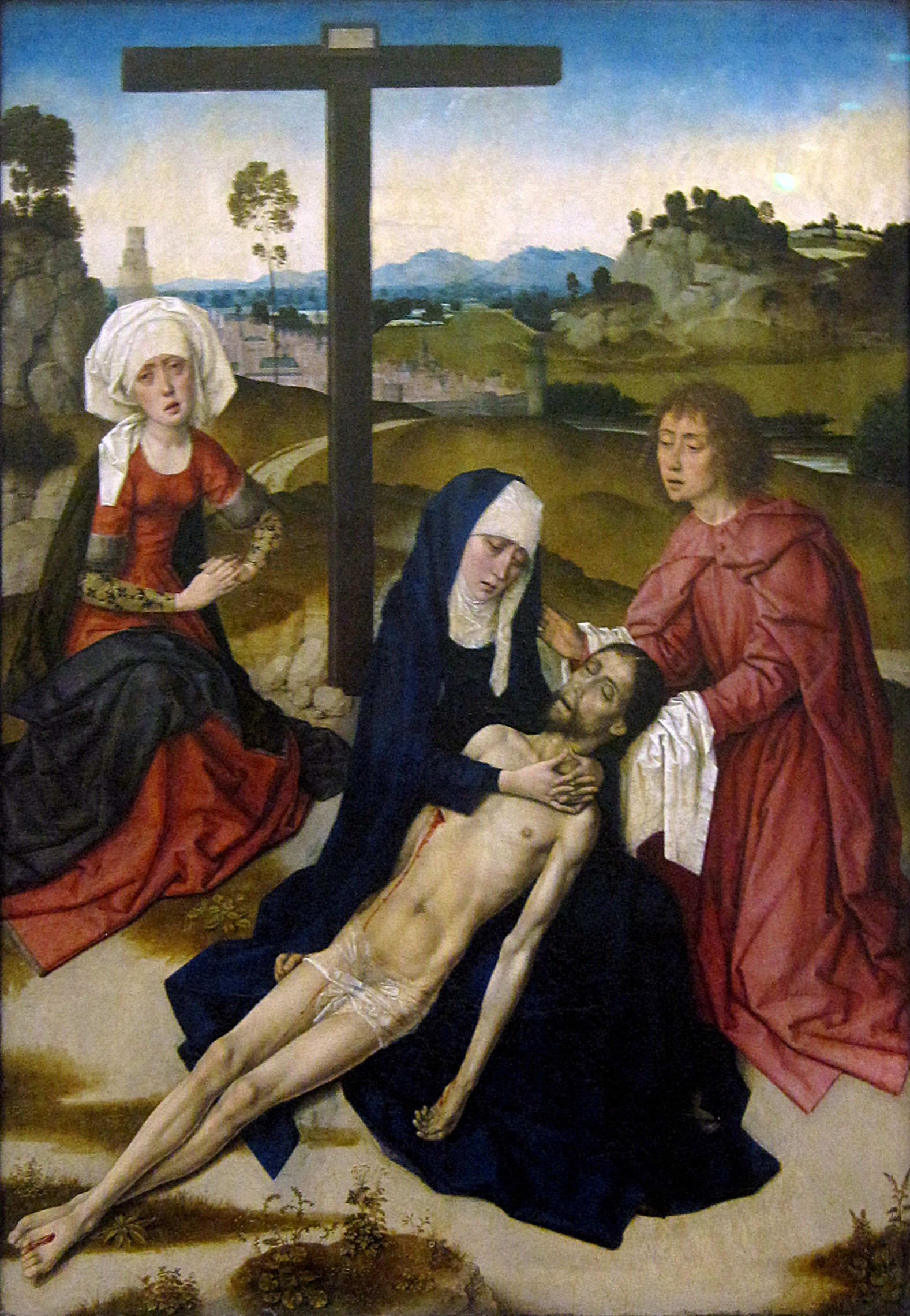 Peinture fiamande au Louvre, Paris